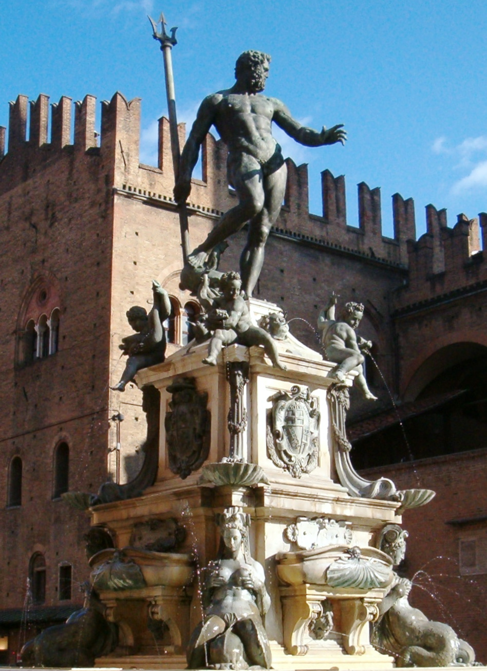 Bologna, fontana del Nettuno.